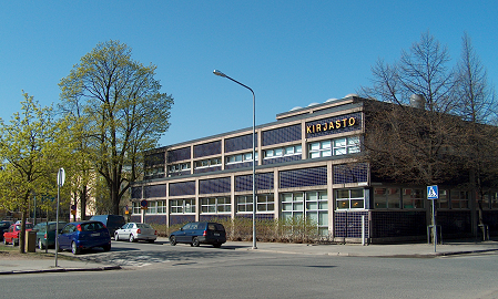 Porin pääkirjasto